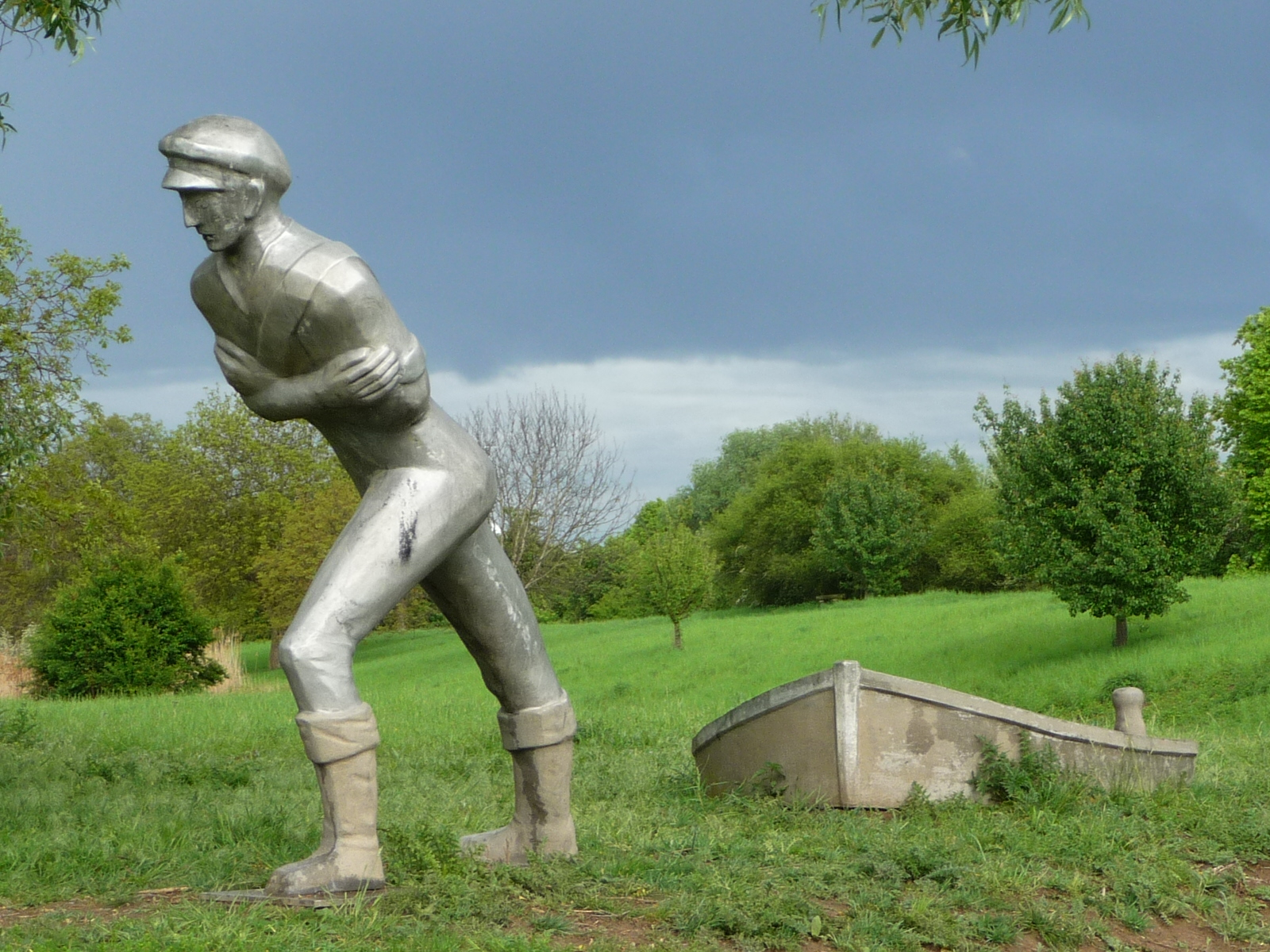 Skulptur des Treidlers auf dem Ufer von Frankenthaler Kanal